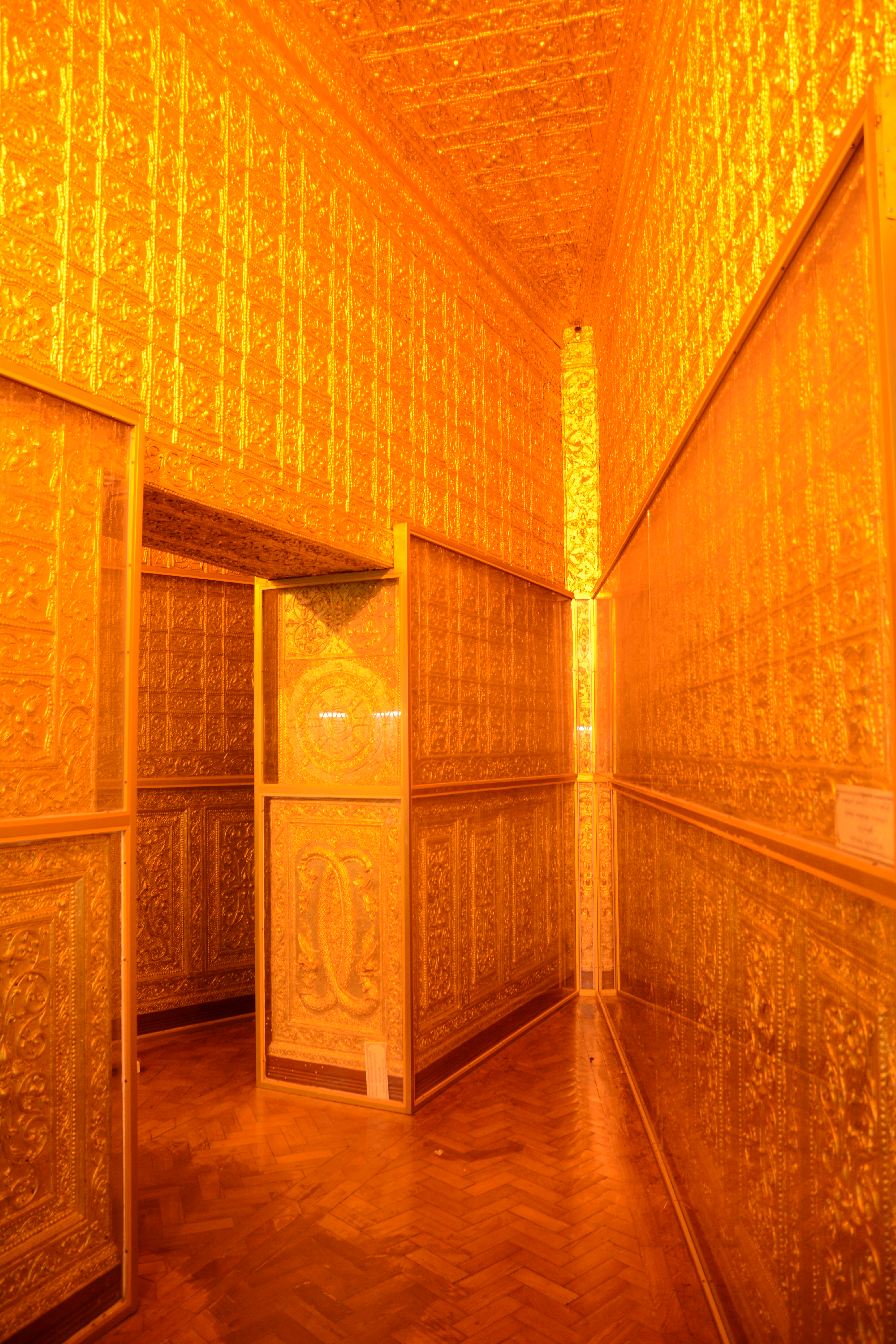 Botahtaung Pagoda